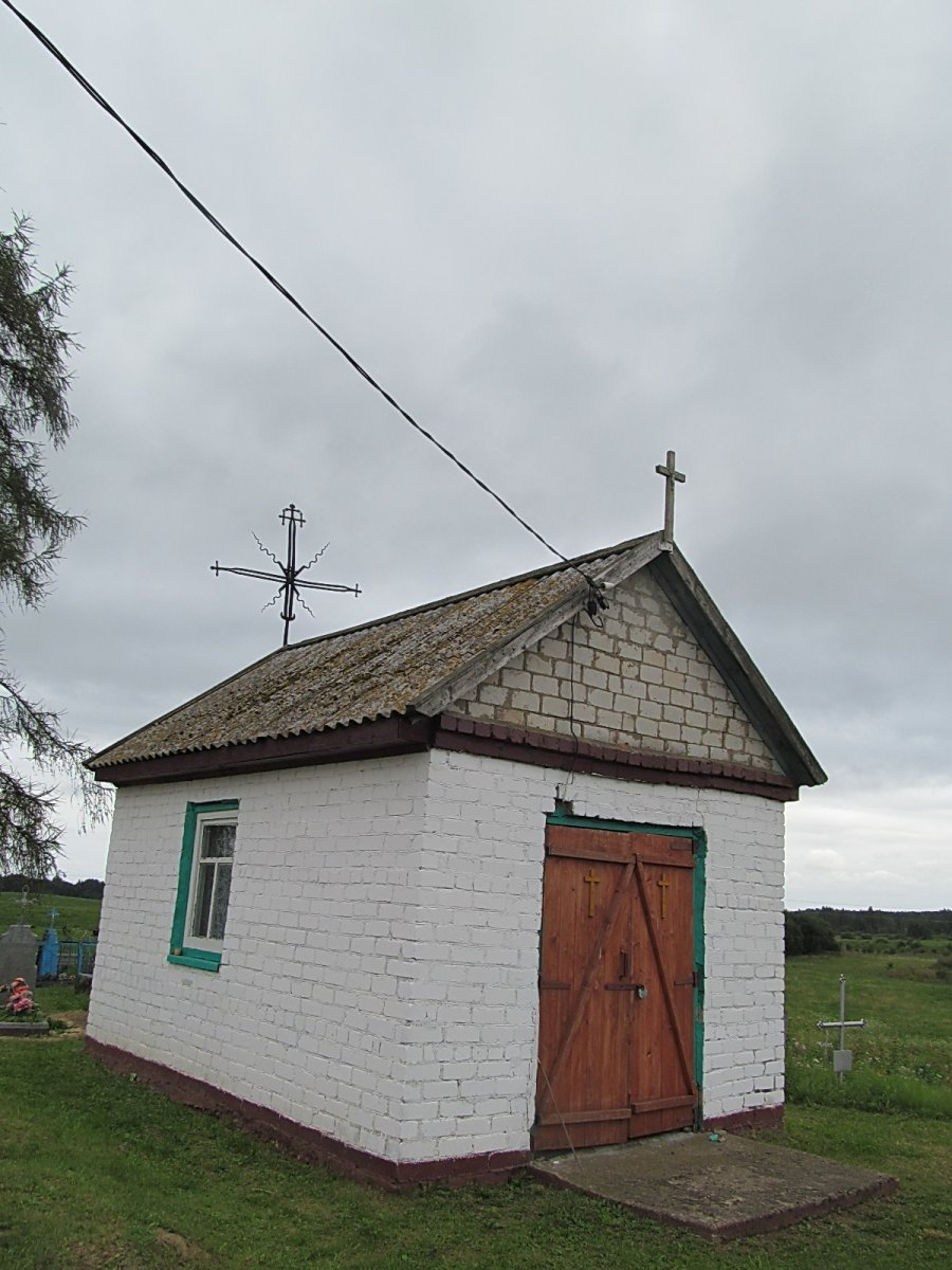 Дзедзіна (Мёрскі раён). Капліца